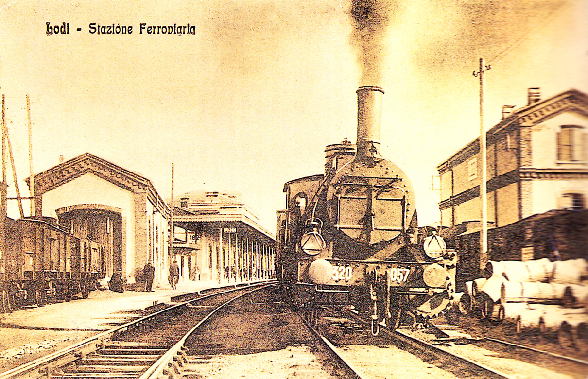 Interno della stazione di Lodi, con locomotiva FS Gr. 320